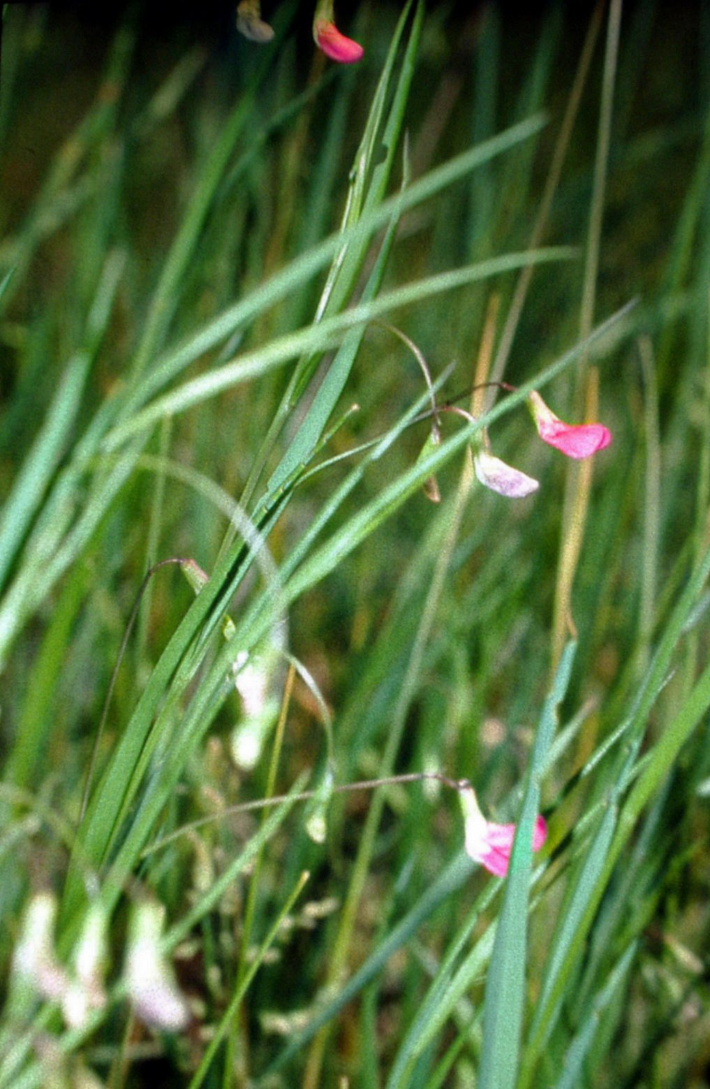 Gras-Platterbse (Lathyrus nissolia)